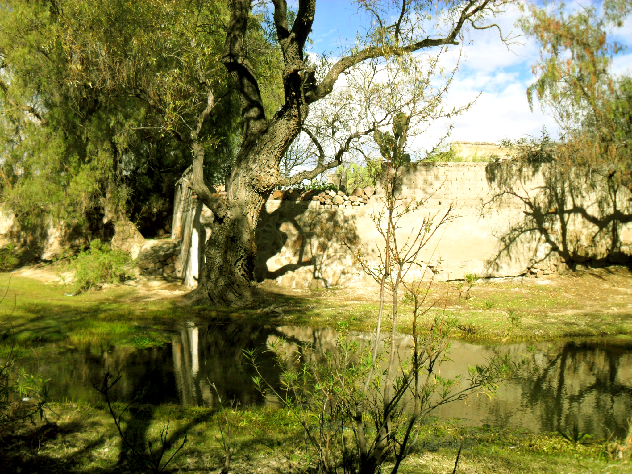 Arroyo que nace de los cerros de la cañada, con pequeños manantiales en el trayecto.